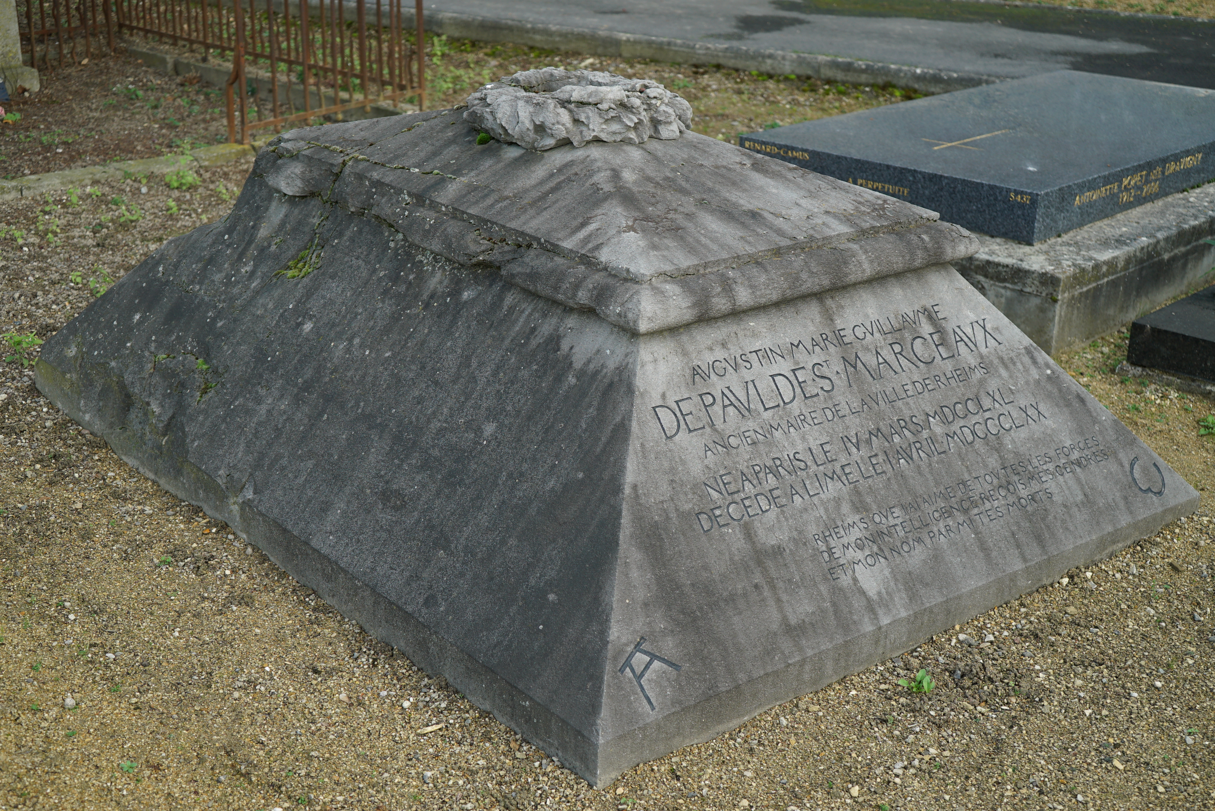 famille de Saint-Marceaux, canton 11.